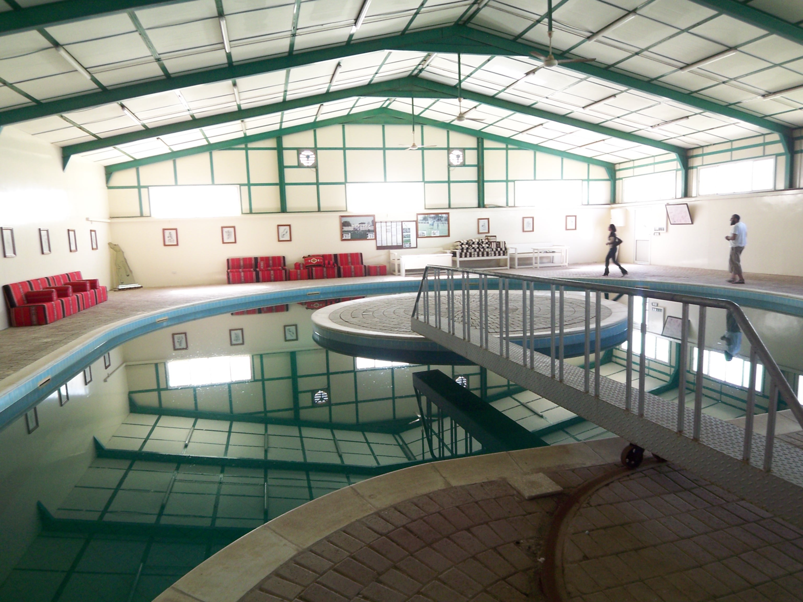 Pferdeschwemme, horse pool